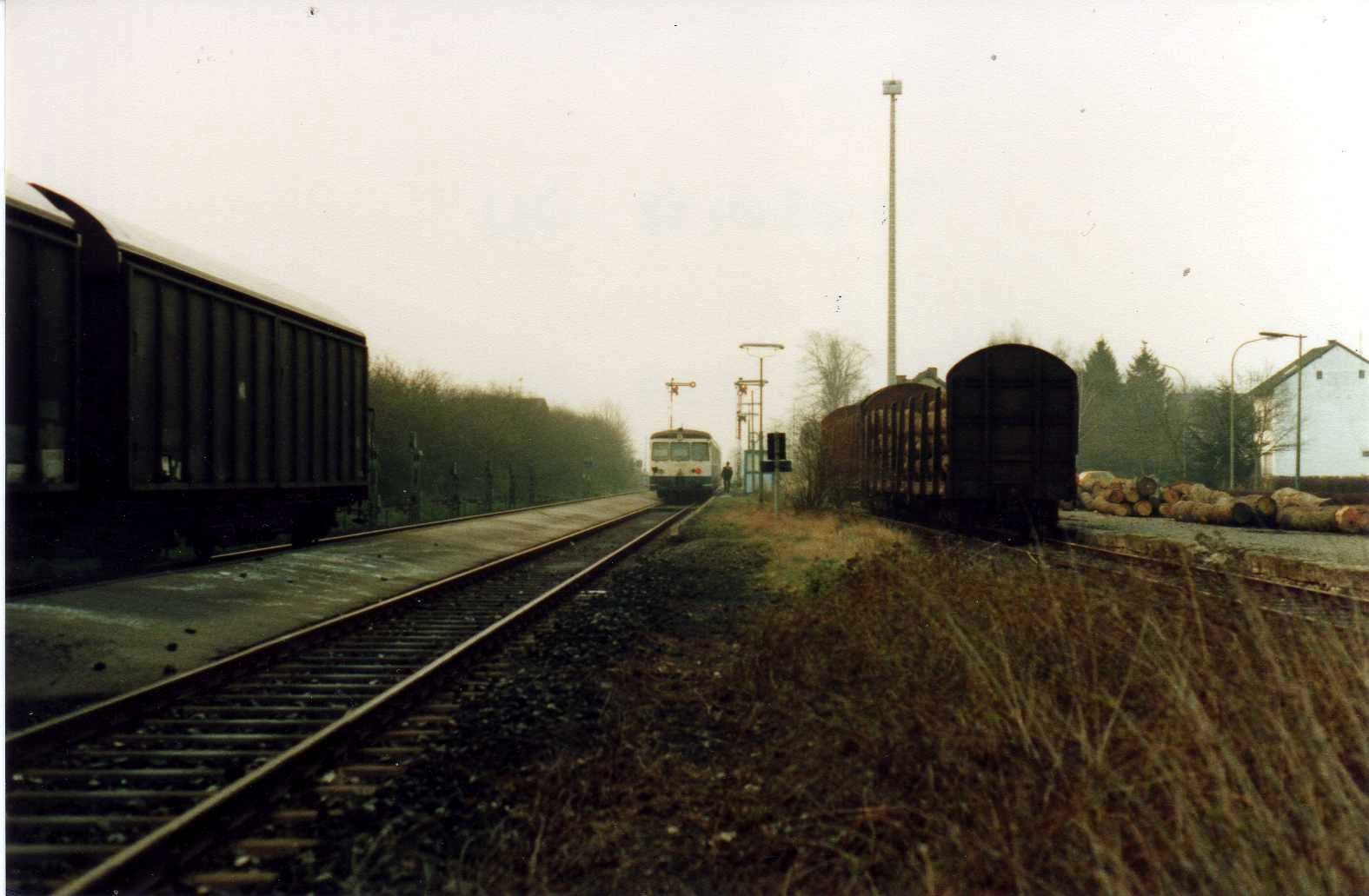 Bis April 1988 bekam ein holzverarbeitender Betrieb in Huchem-Stammeln ab und zu Waggons mit Baumstämmen (rechts), hier aus Frankreich. In der Mitte der Akkutriebwagen nach Düren, links der tägliche Güterzug nach Jülich.